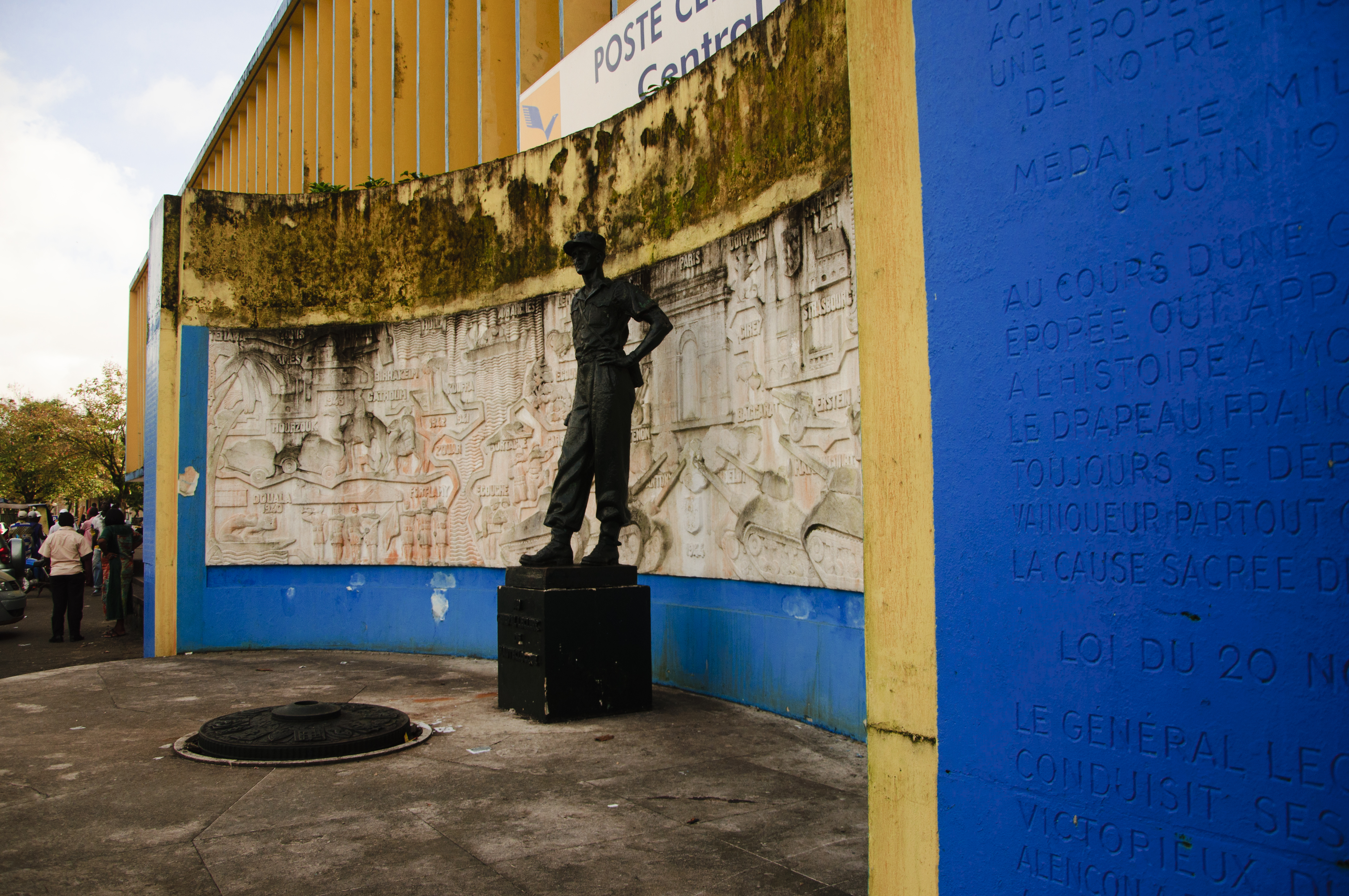 Monument au général Leclerc Bonajo-Douala Le personnage et l'histoire( l'histoire est la connaisance du pasée basé sur les écrits)